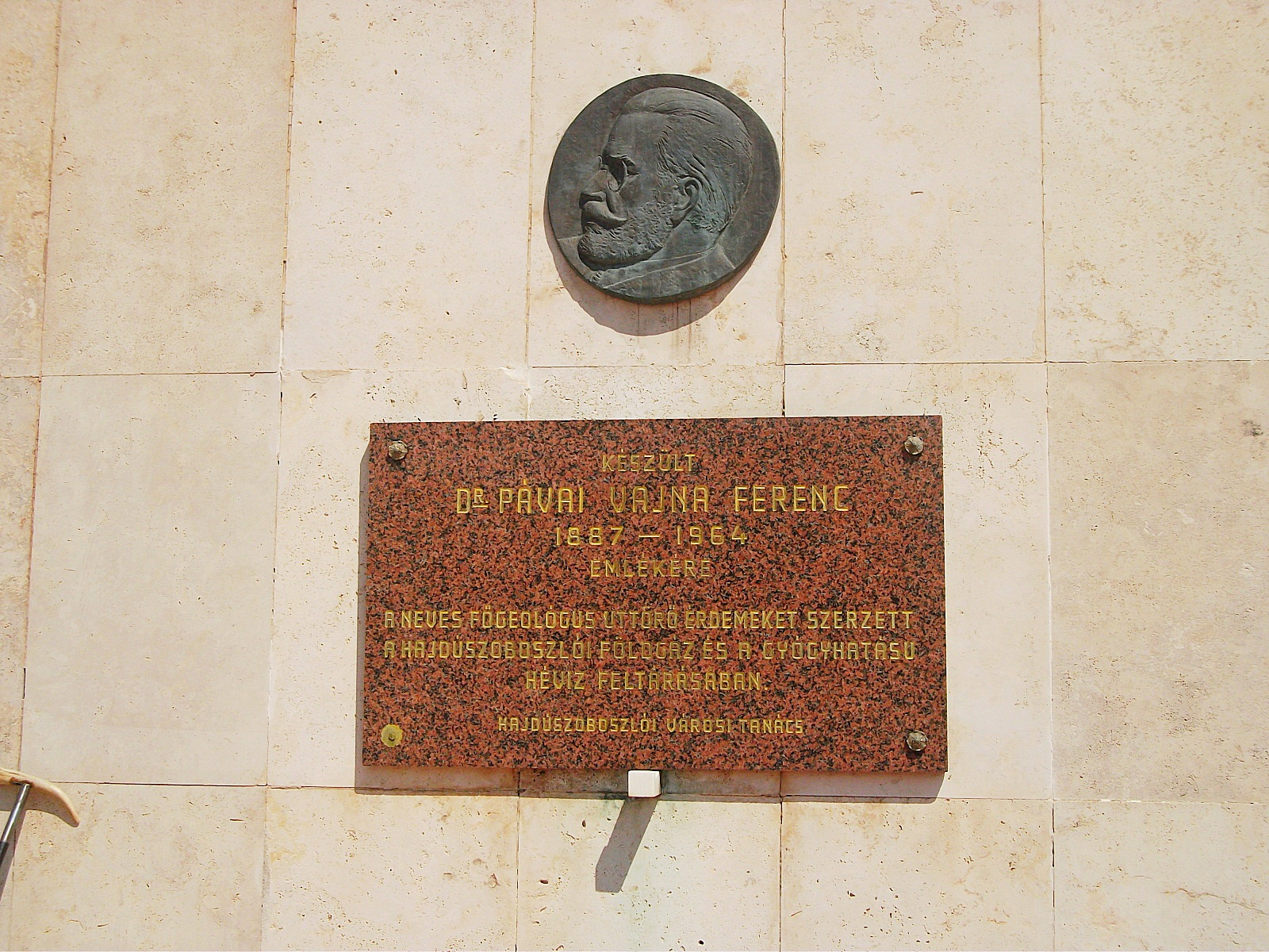 Pávai-Vajna Ferenc emléktáblája a hajdúszoboszlói termálfürdő falán helyezkedik el. Az emléktábla Somogyi Árpád 1982-ben felállított emléktáblája.